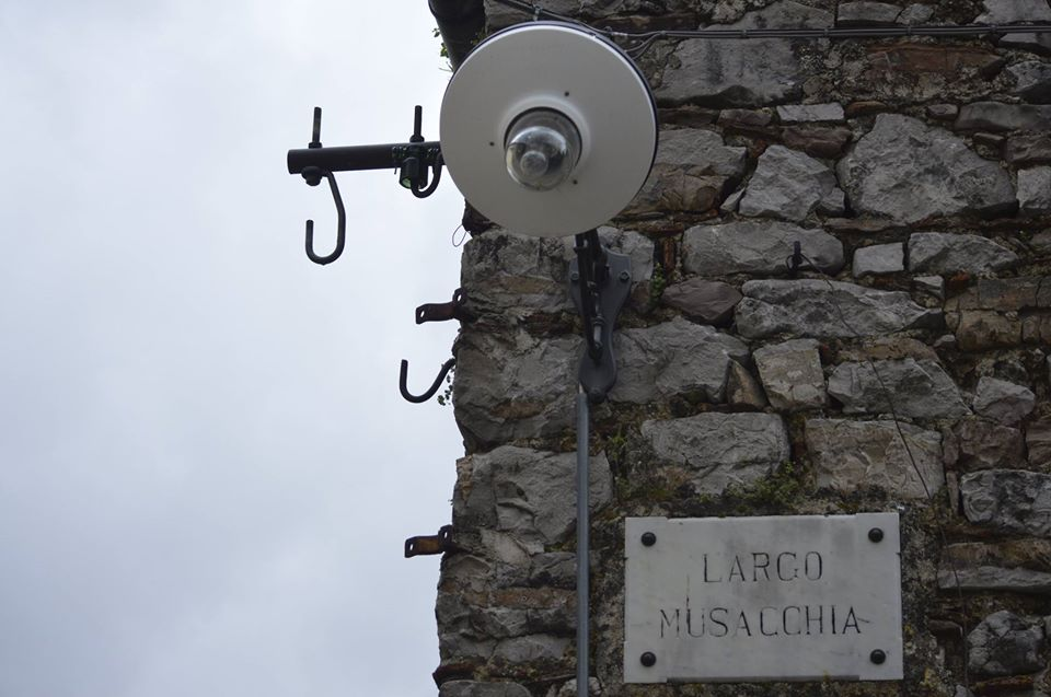 Largo della famiglia albanese Musacchia (Muzaka) a Santa Cristina Gela (PA).